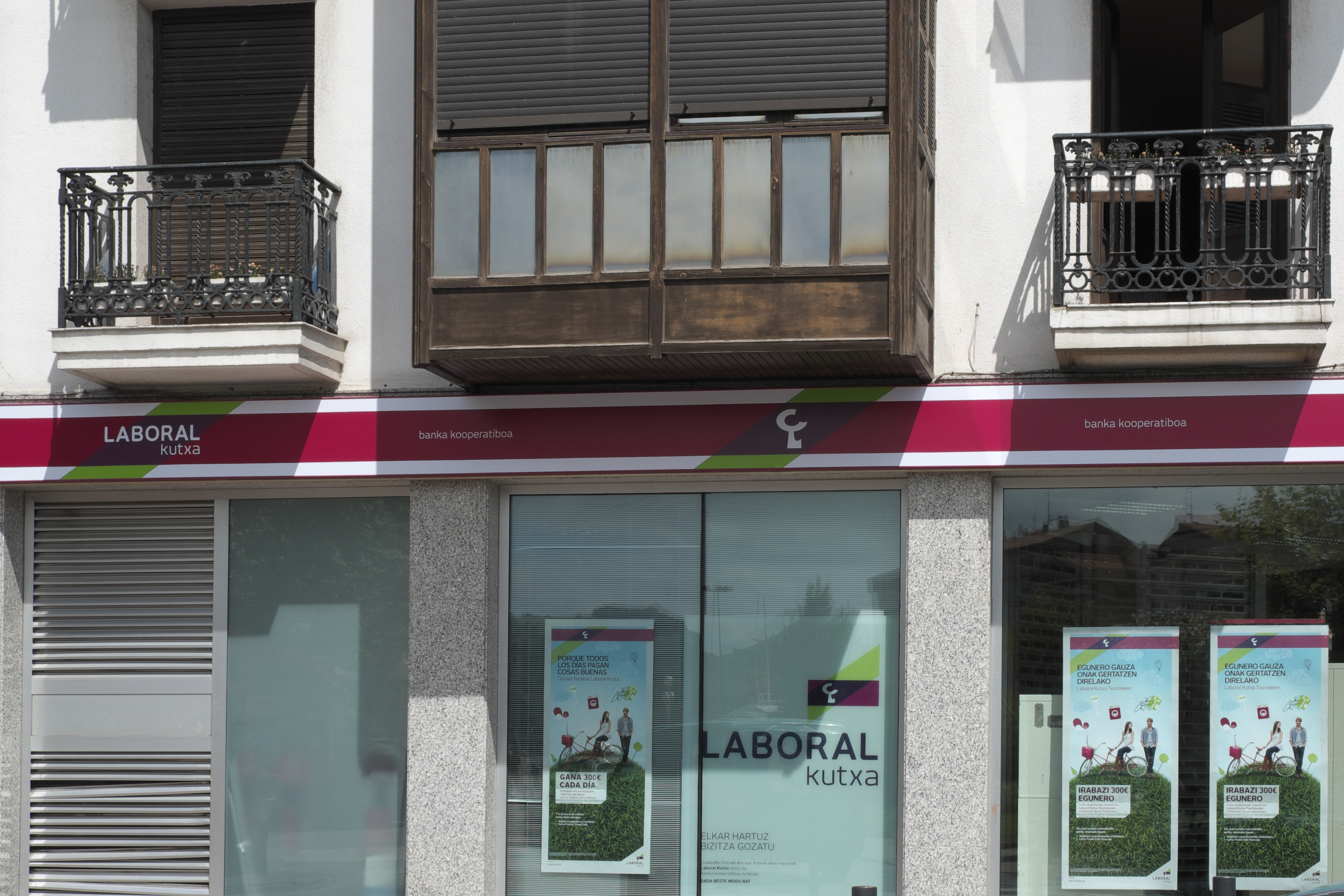 Gebäude der Caja Laboral in Zumaia in der Provinz Gipuzkoa (País Vasco/Spanien)